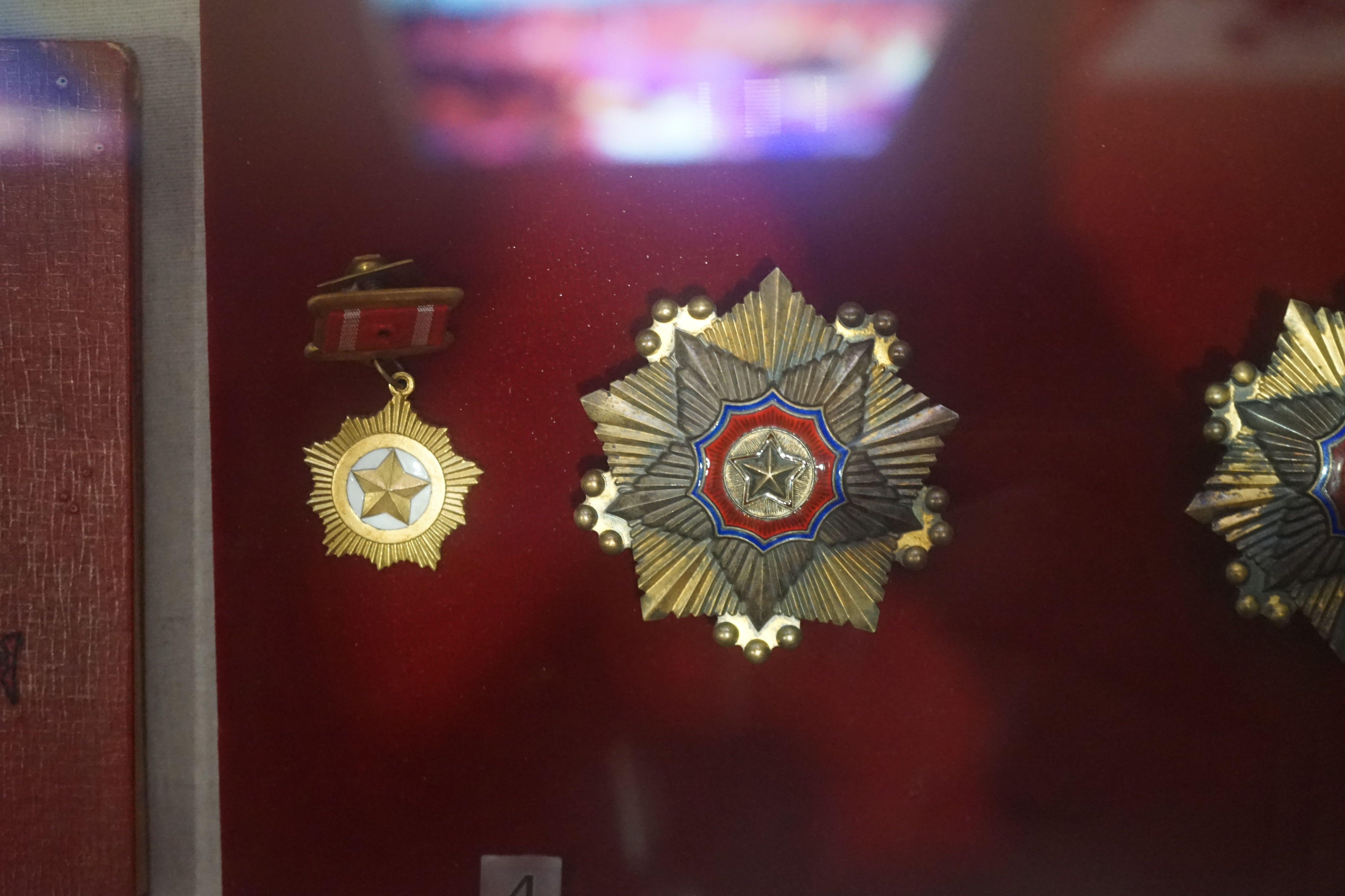 邱少云所获朝鲜民主主义共和国一级国旗勋章、金星奖章。一级文物